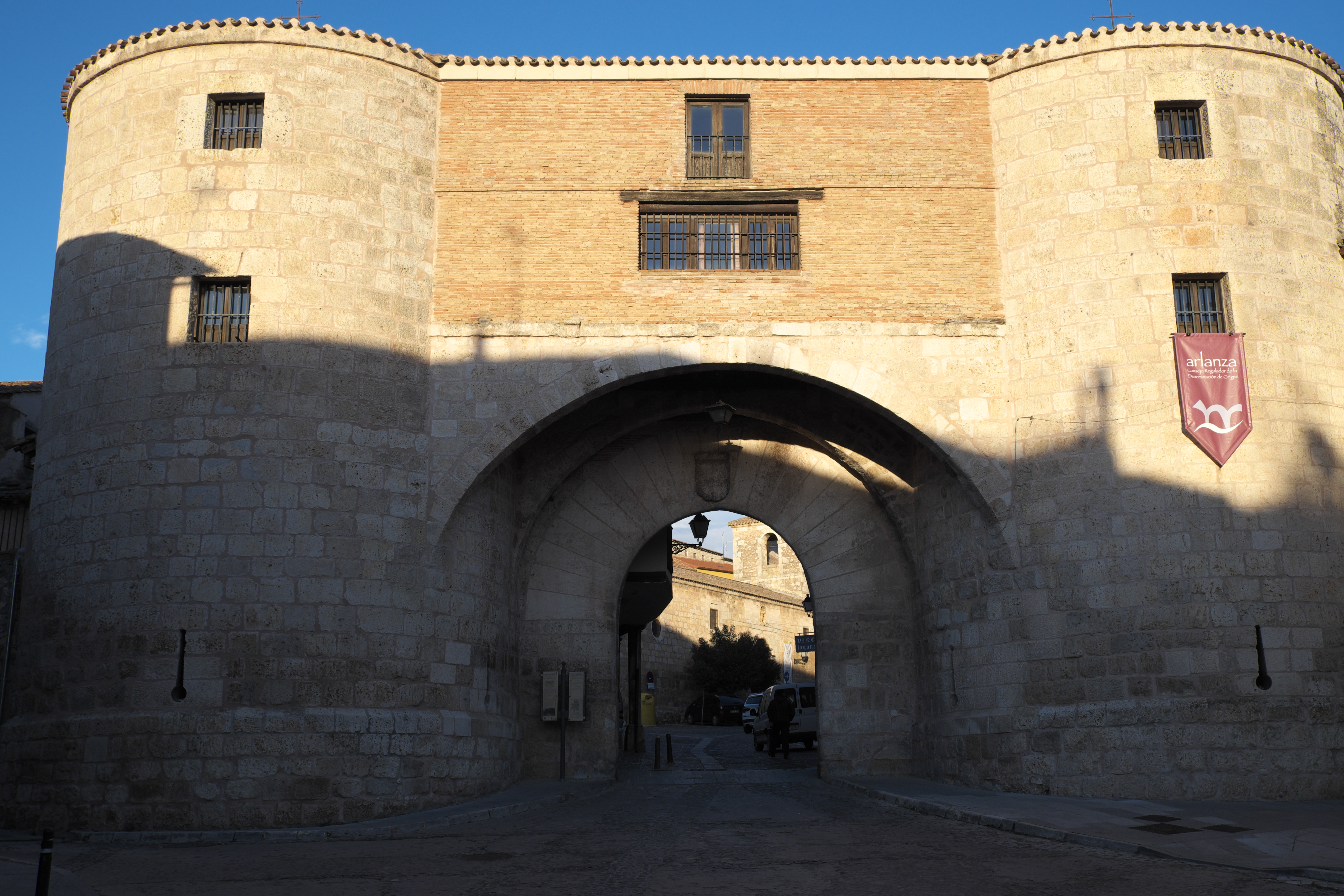 Arco de la Cárcel in Lerma in der Provinz Burgos (Kastilien-León/Spanien)